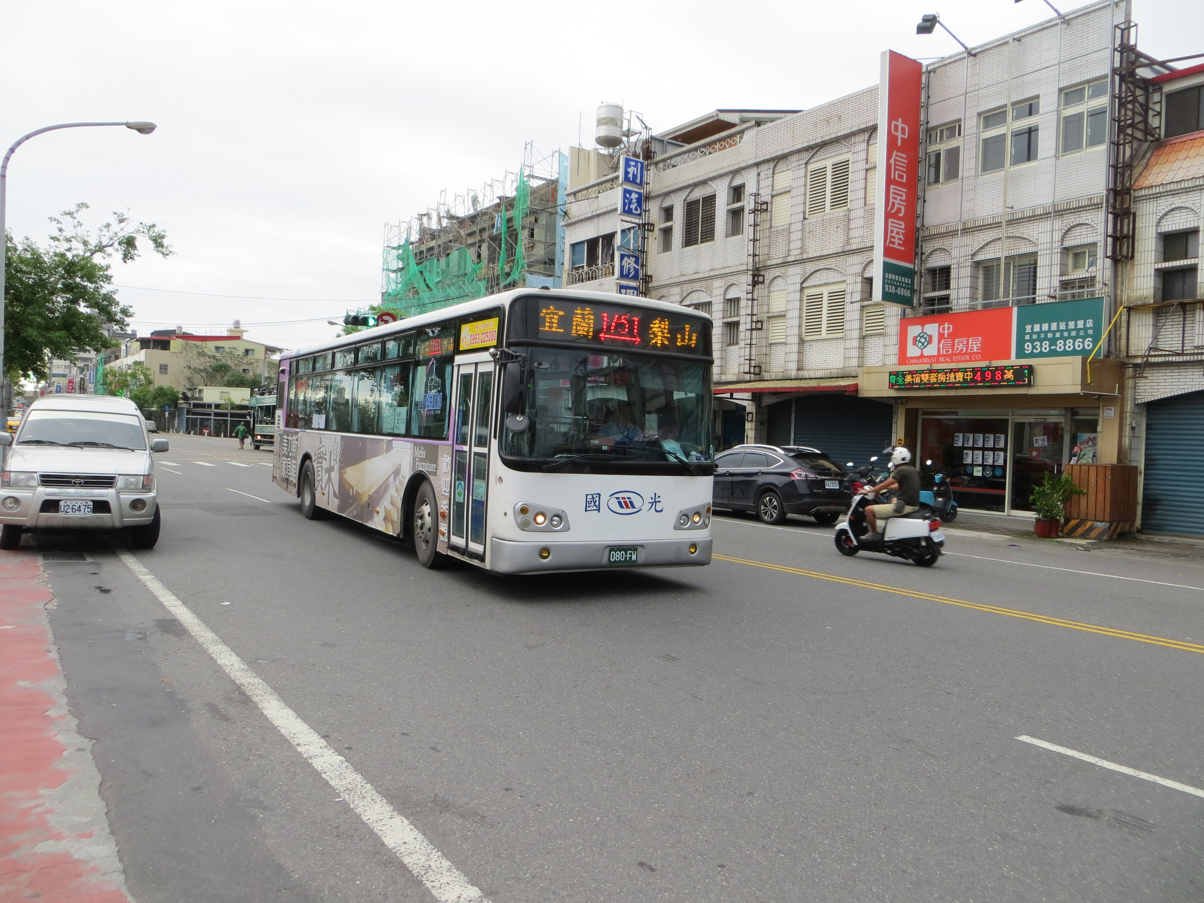 國光客運仍有營運來往宜蘭─梨山的公路客運，編號1751，每日二往返，已可用電子票證乘車。圖為2015年10月7日，自宜蘭轉運站駛出的1751路線，由080-FW負責，準備在早上7:30前往梨山。